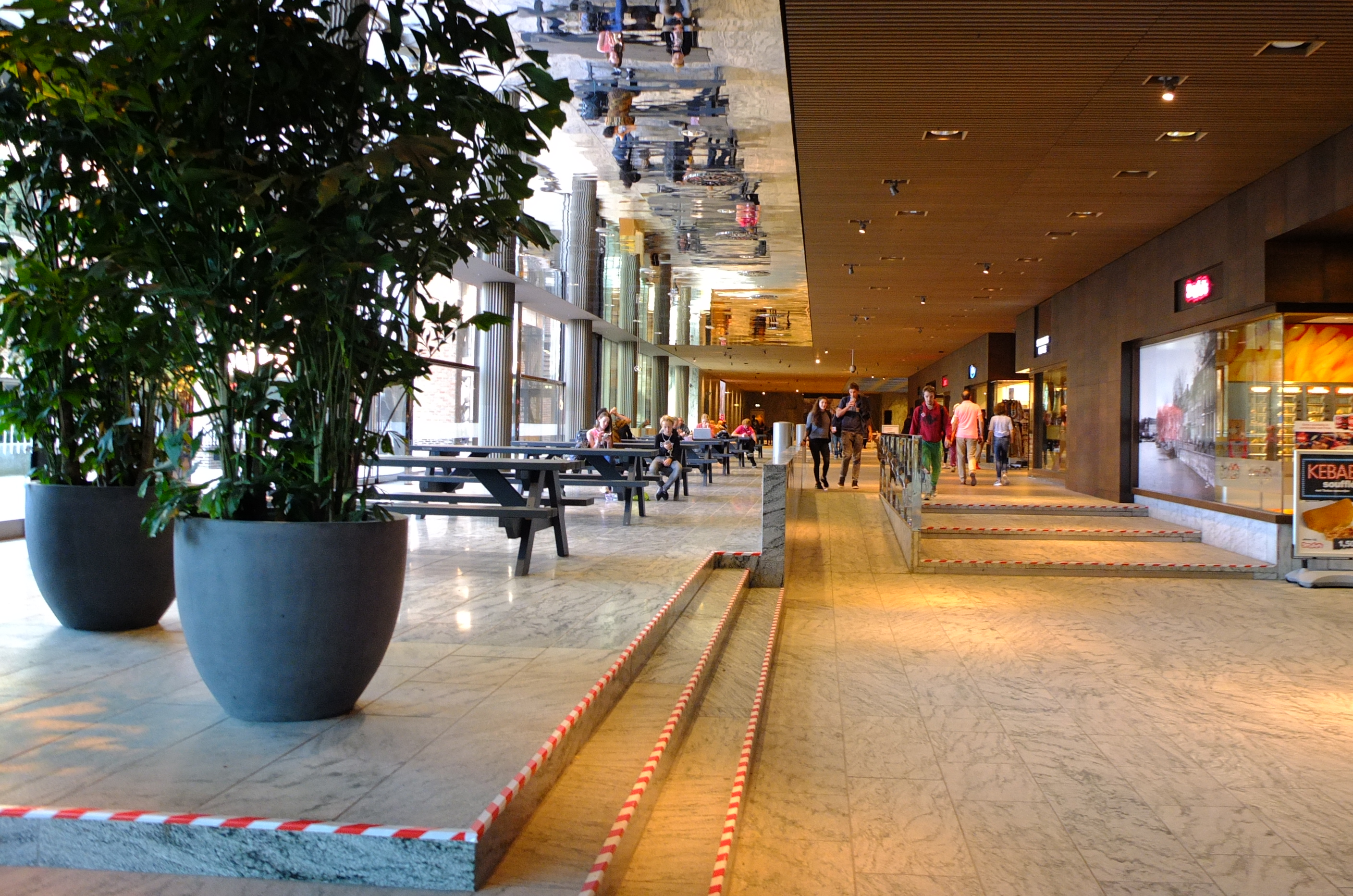 Interieur Nieuwe Station Breda